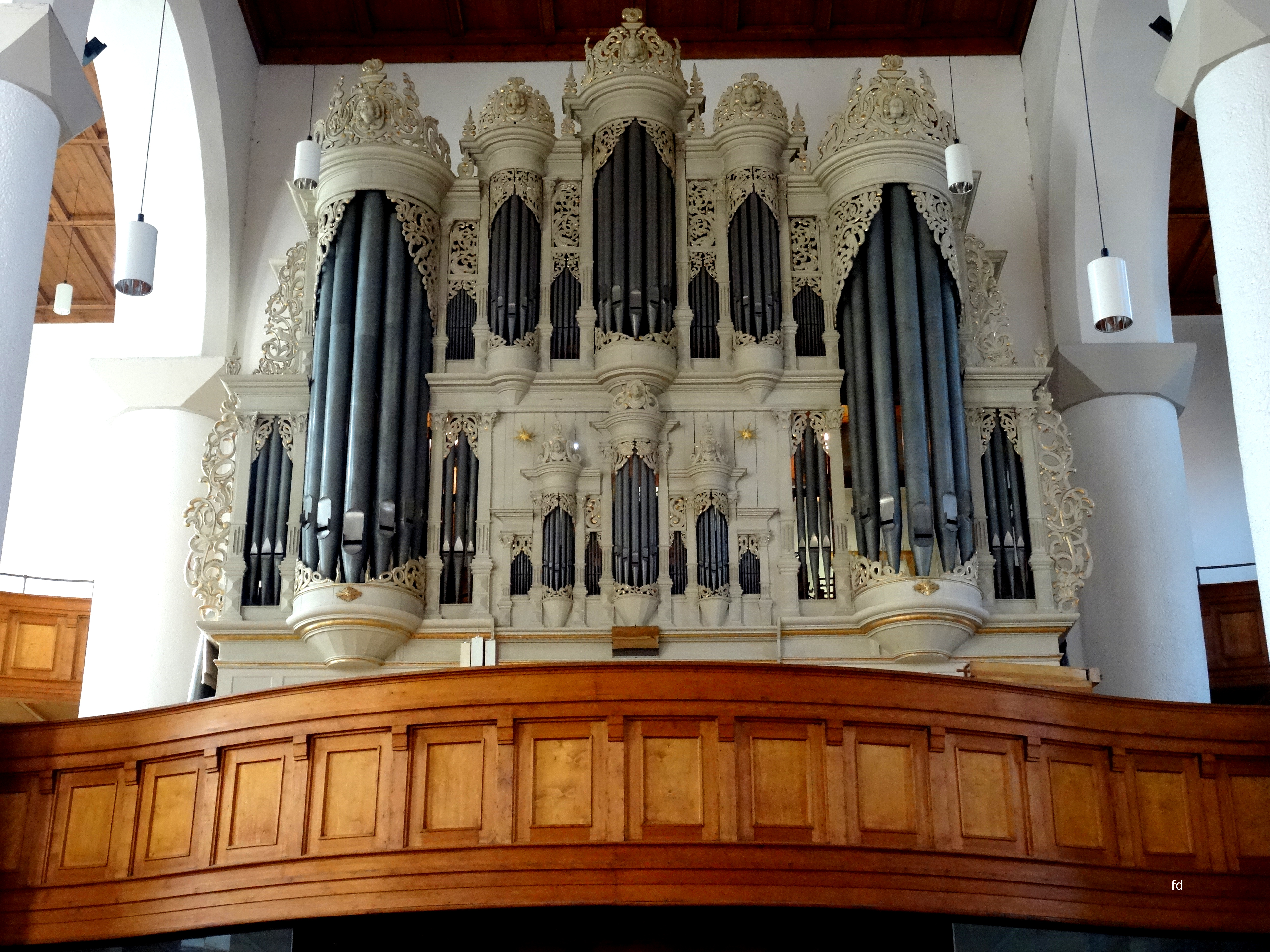 Orgel der Margarethenkirche in Gotha